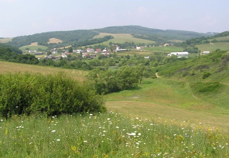 Celkový pohľad